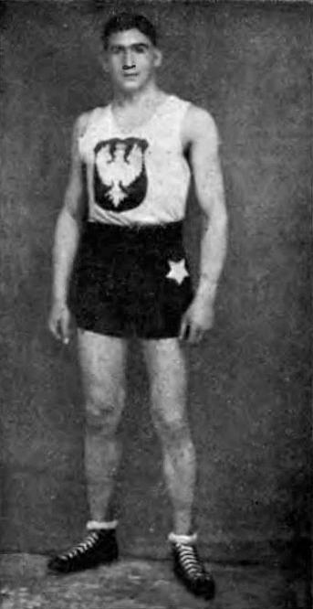 Tomasz Konarzewski (1924)